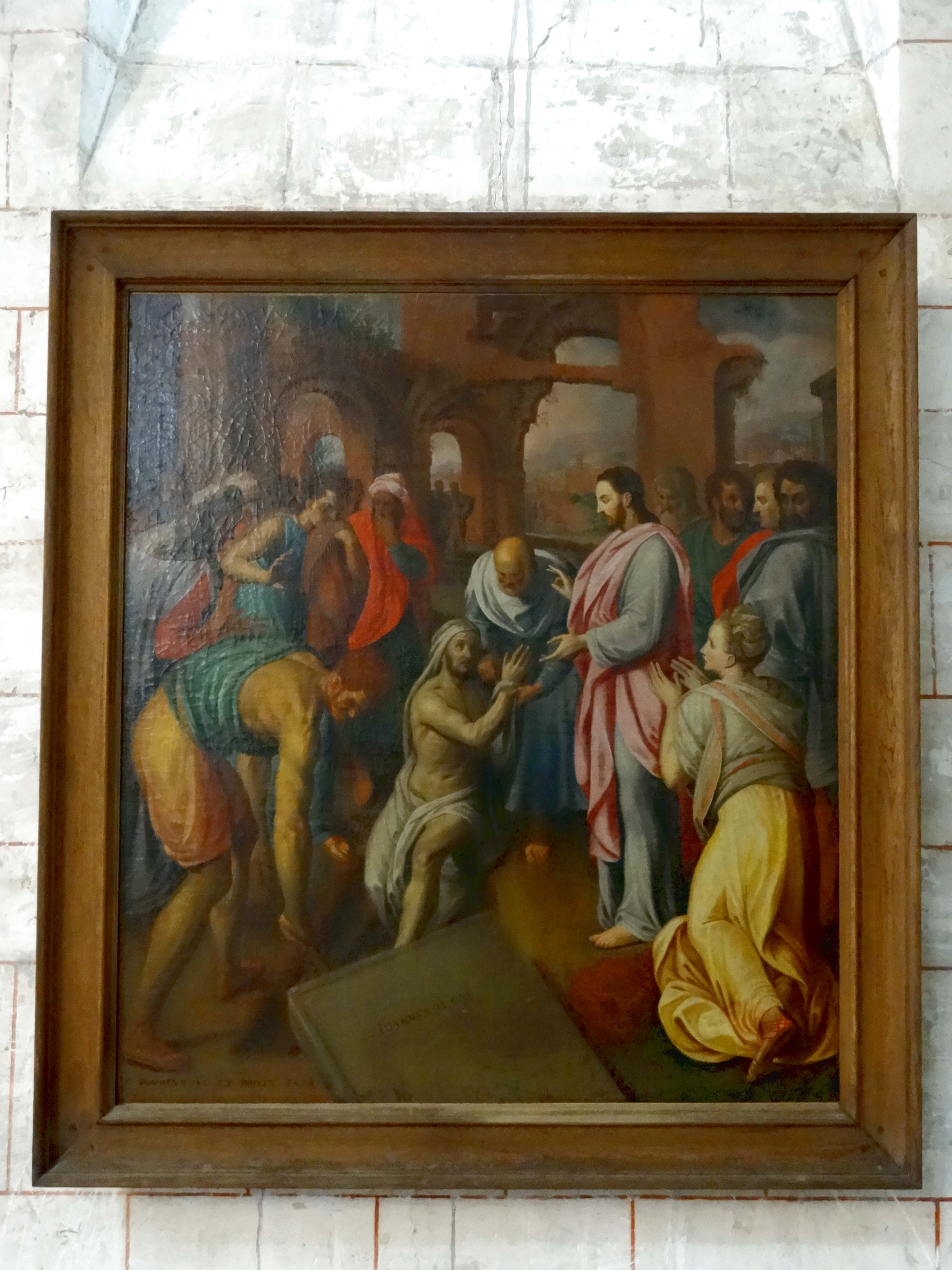 Tableau - la Résurrection de Lazare, par Franz Pourbus le Vieux (1545-1581).